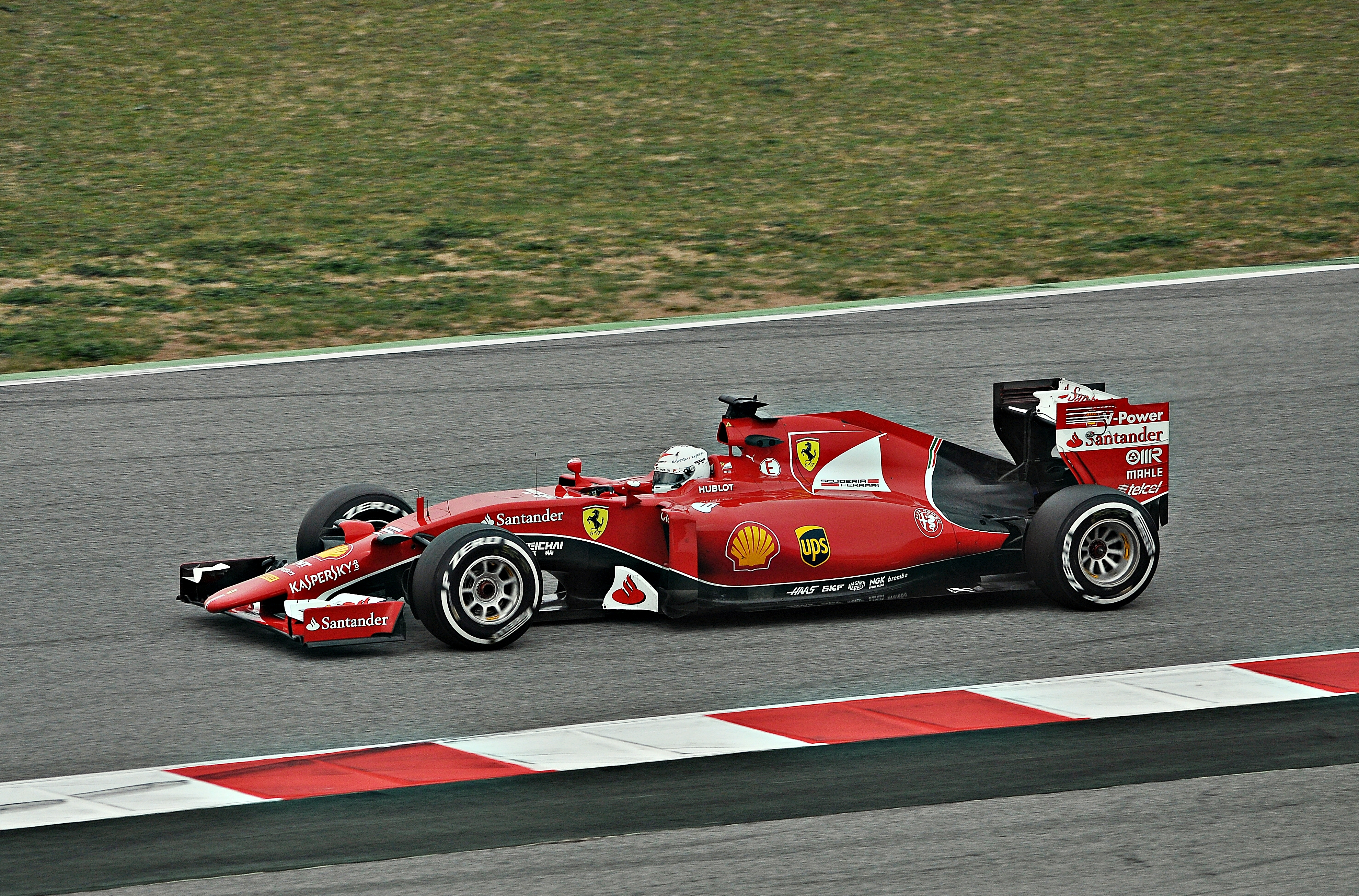 Test days Barcelona 2015